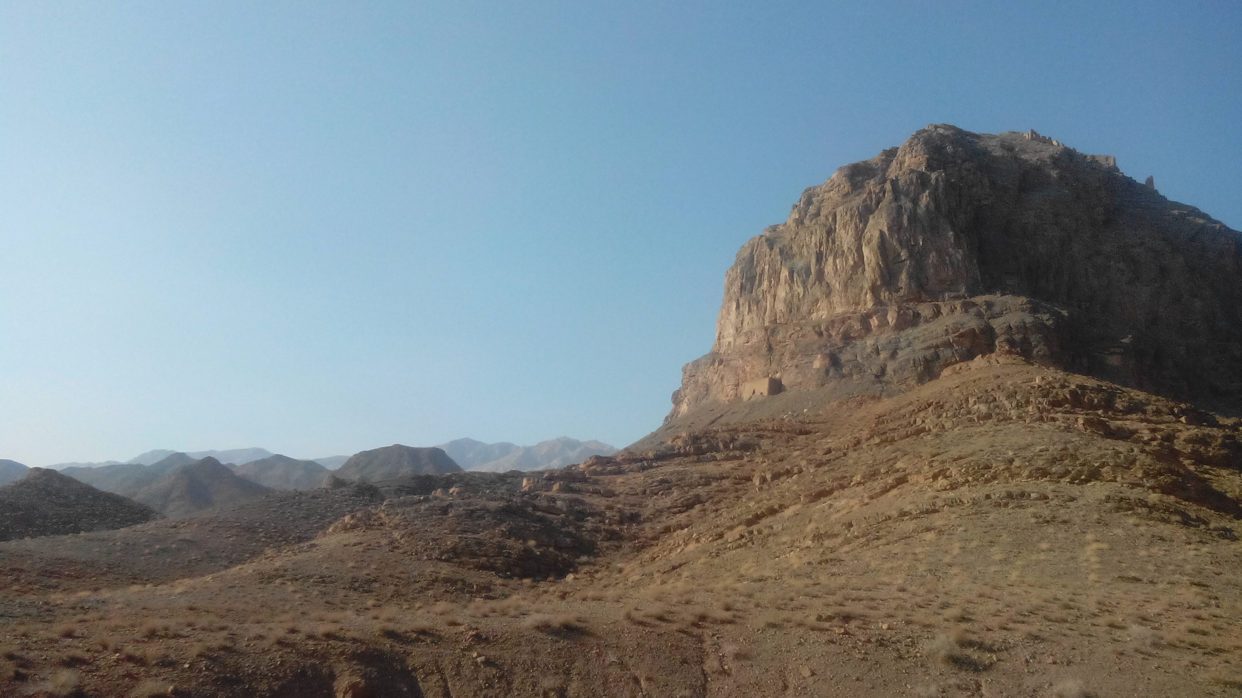 دیدن آن بسیار دلنشین و ویژه خواهد بود